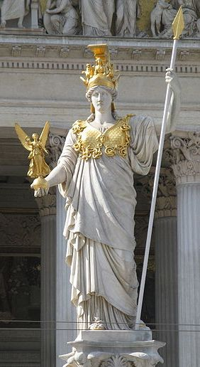 Pallas Athena statue.